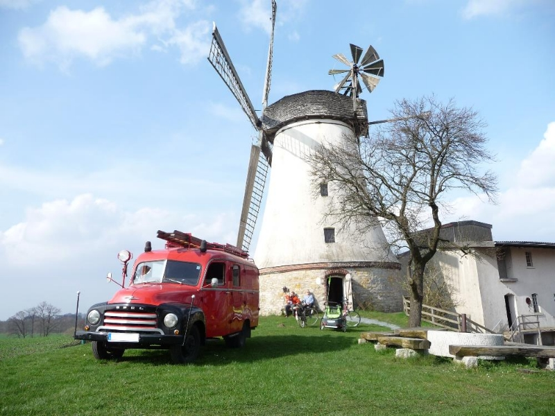 Alter Opel Blitz Feuerwehrwagen vor der Windmühle